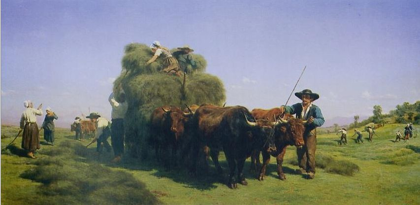 La fenaison (1859) de Rosa Bonheur (1822-1899)